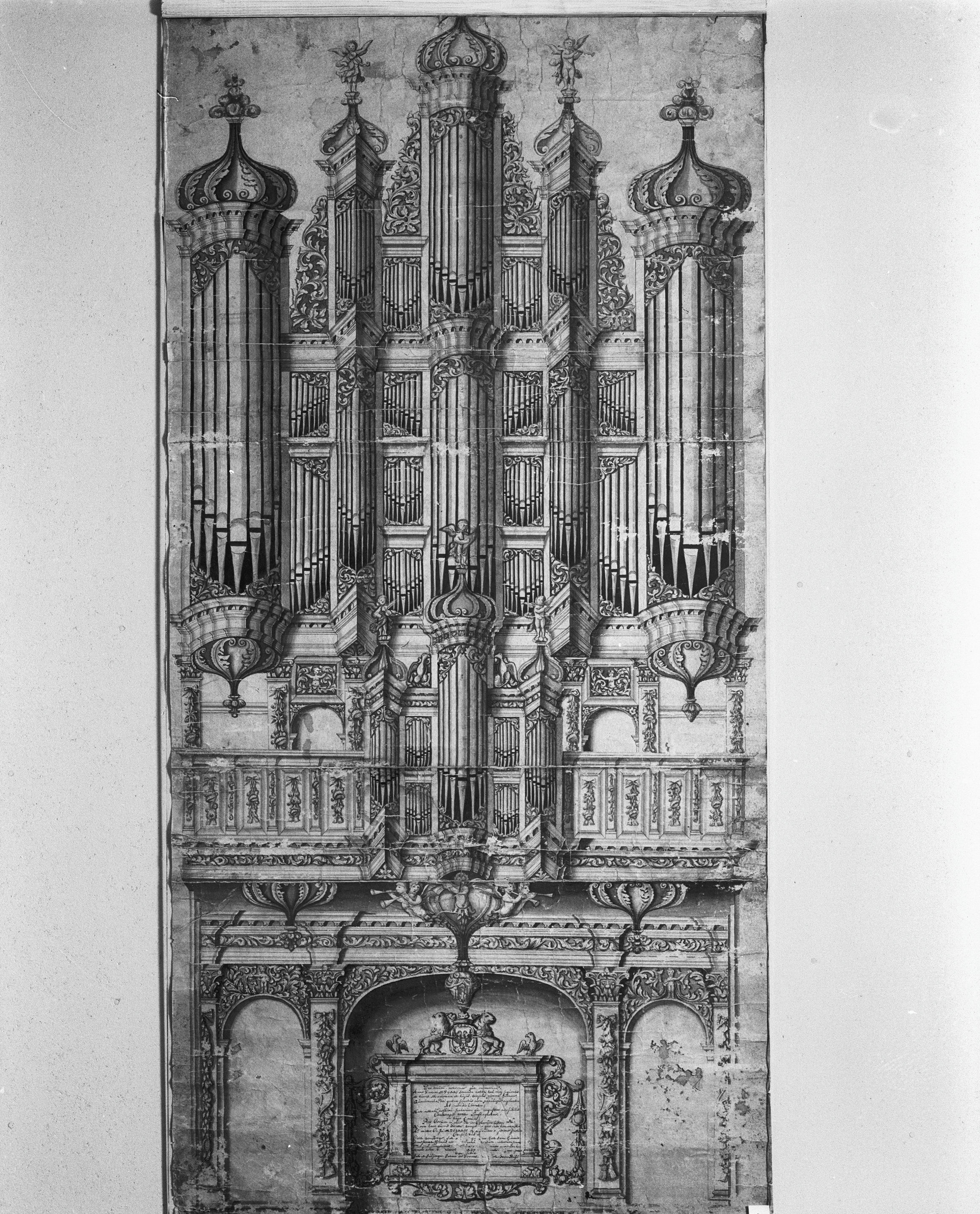 A-Kerk: voormalig Orgel dat werd verwoest bij de instorting van de toren in 1710.